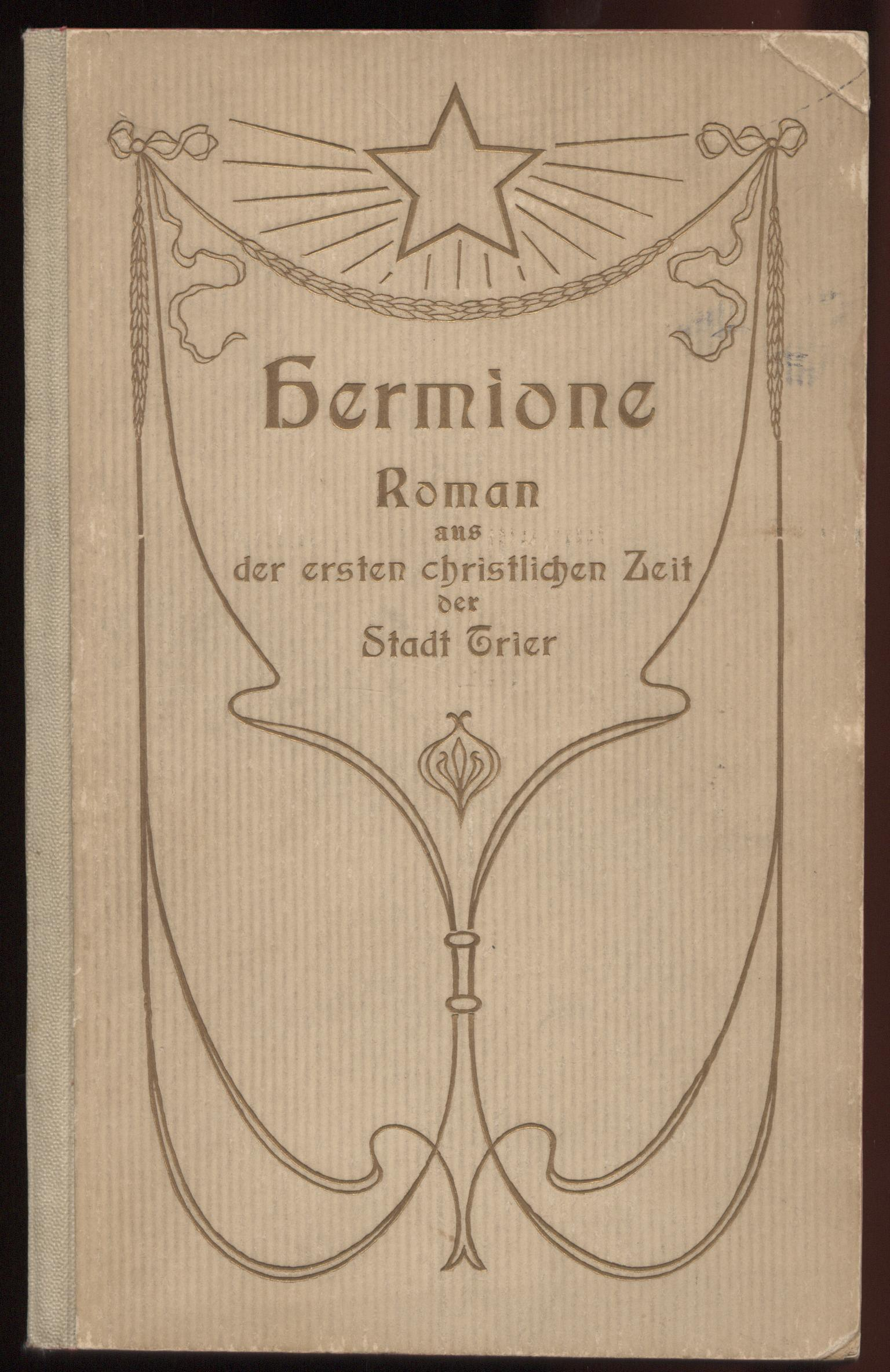 Franziska Riotte, Buchcover